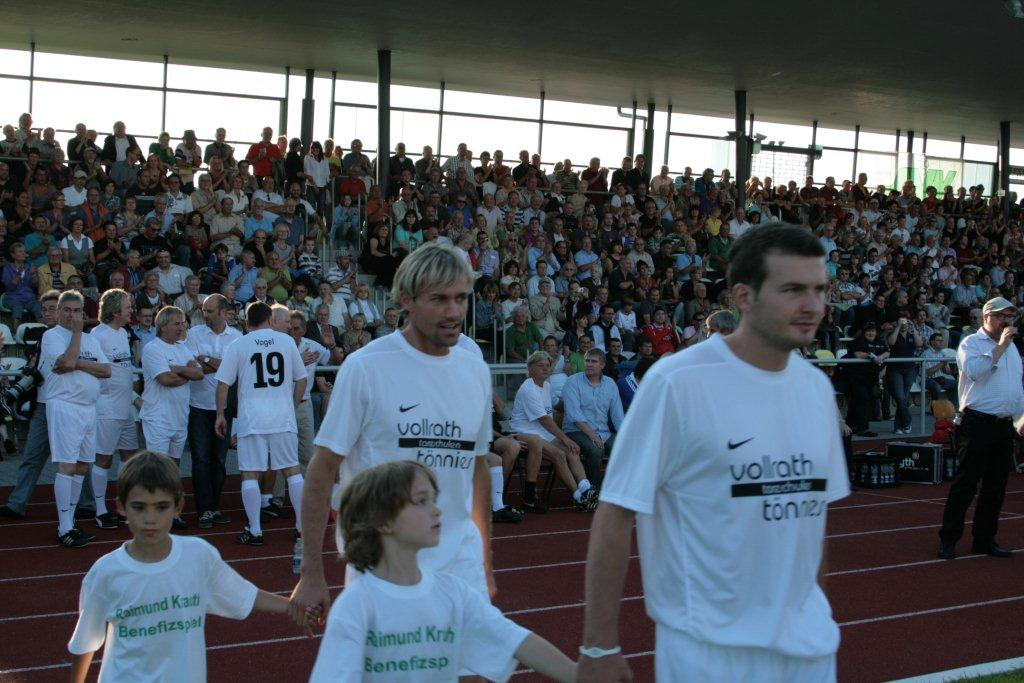 Sven Hannawald and Andreas Görlitz at the benefit match KSC Allstars versus Eintracht Frankfurt Altstars on July, 30th 2010 in Karlsruhe